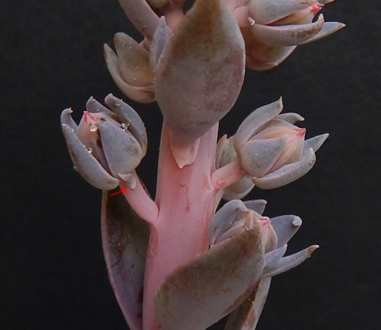 d